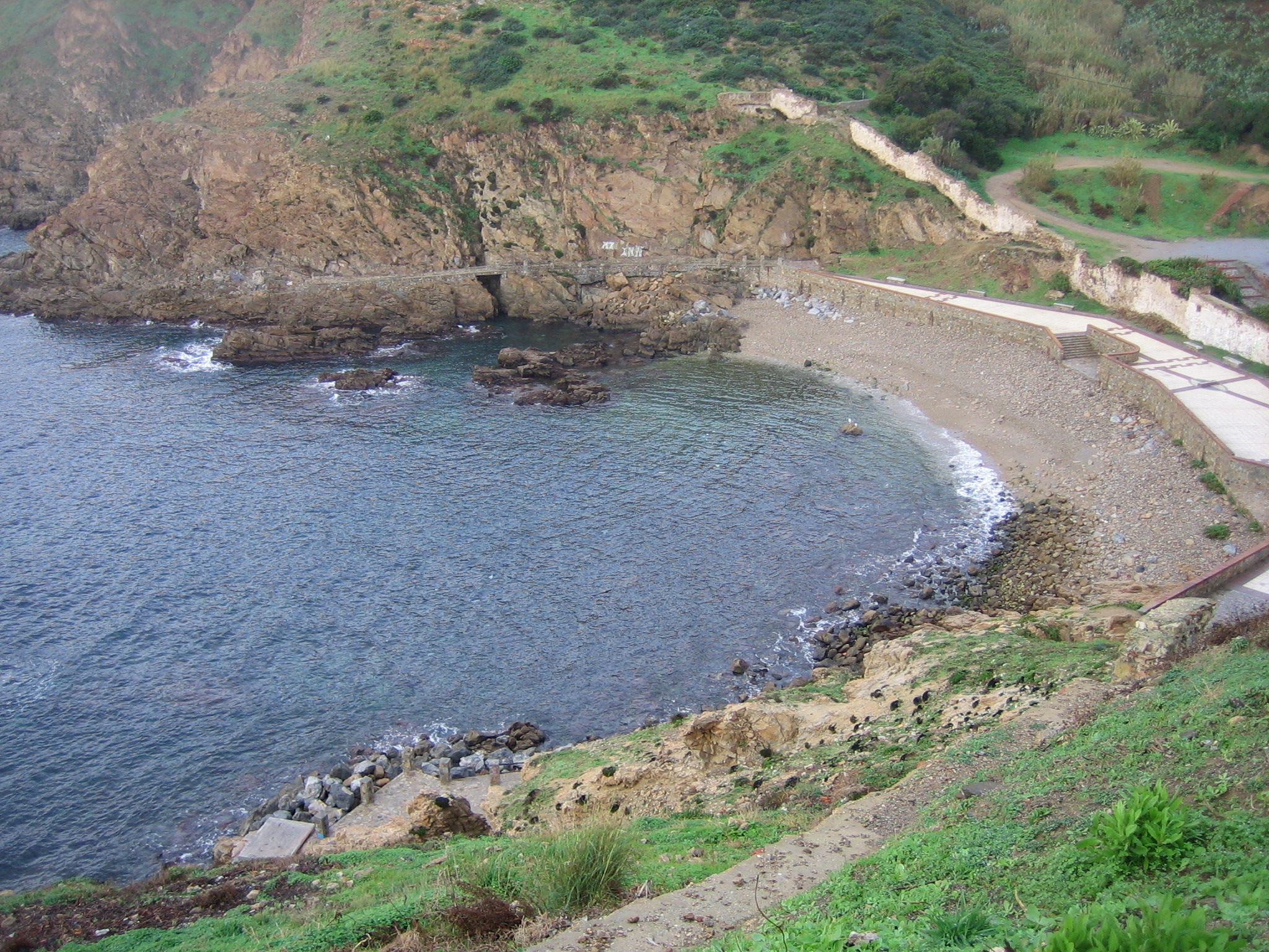 Playa del Desnarigado